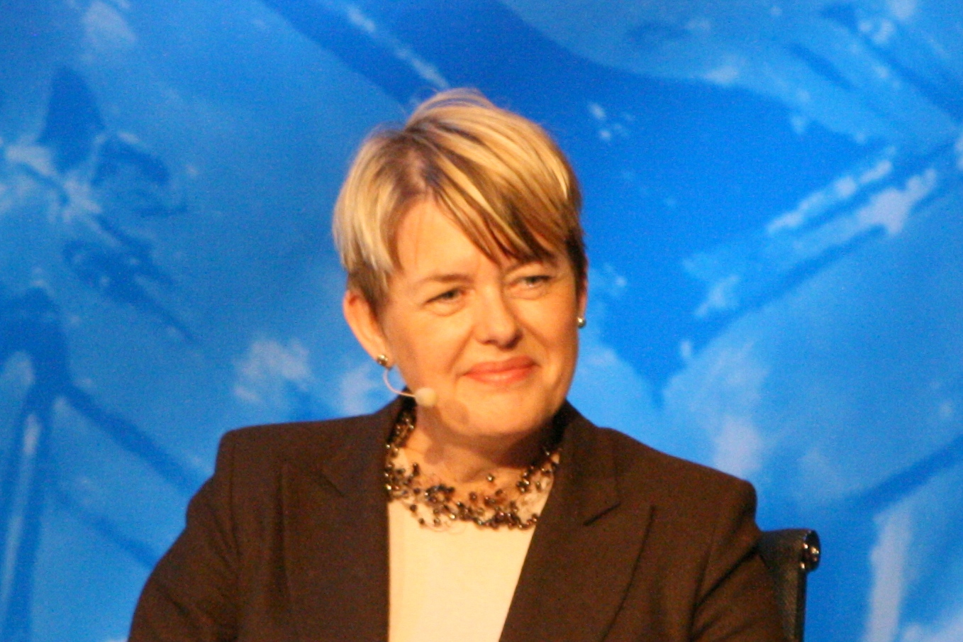 Astrid Søgnen, direktør for utdanningsetaten i Oslo, tidligere statssekretær. Fra NHOs Årskonferanse 2009.